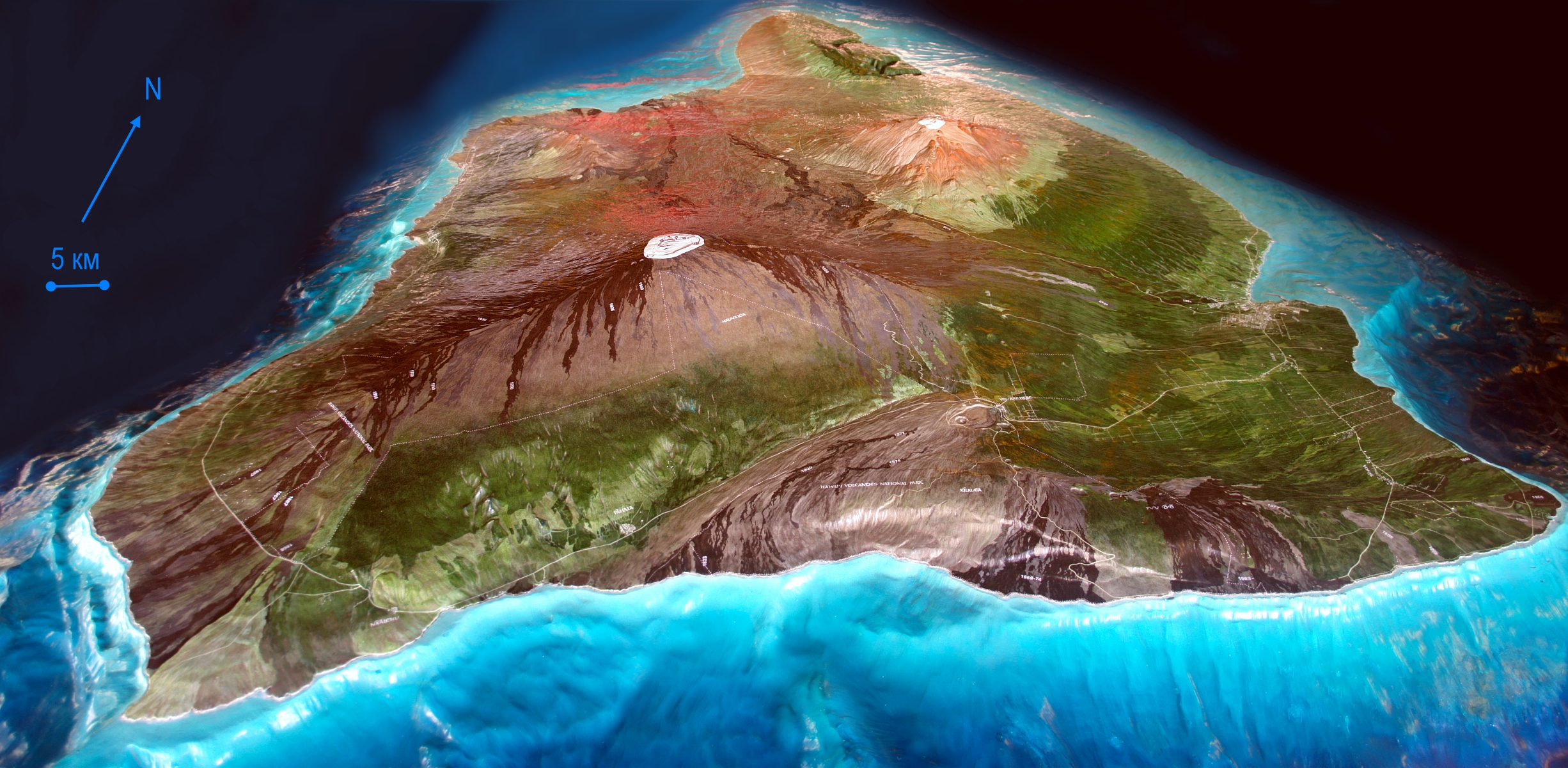 Модель острова Гавайи. Иллюстрация для викиучебника Гавайеведение